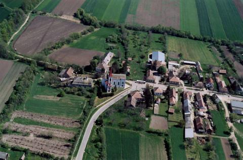 Egyházasfalu, Hungary, aerialphotography